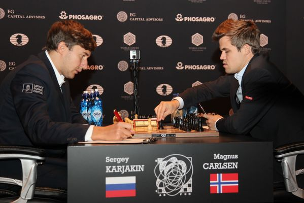 Карлсен - Карякин, 7 партия